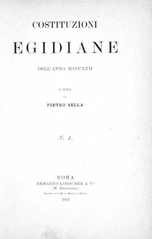 Frontespizio